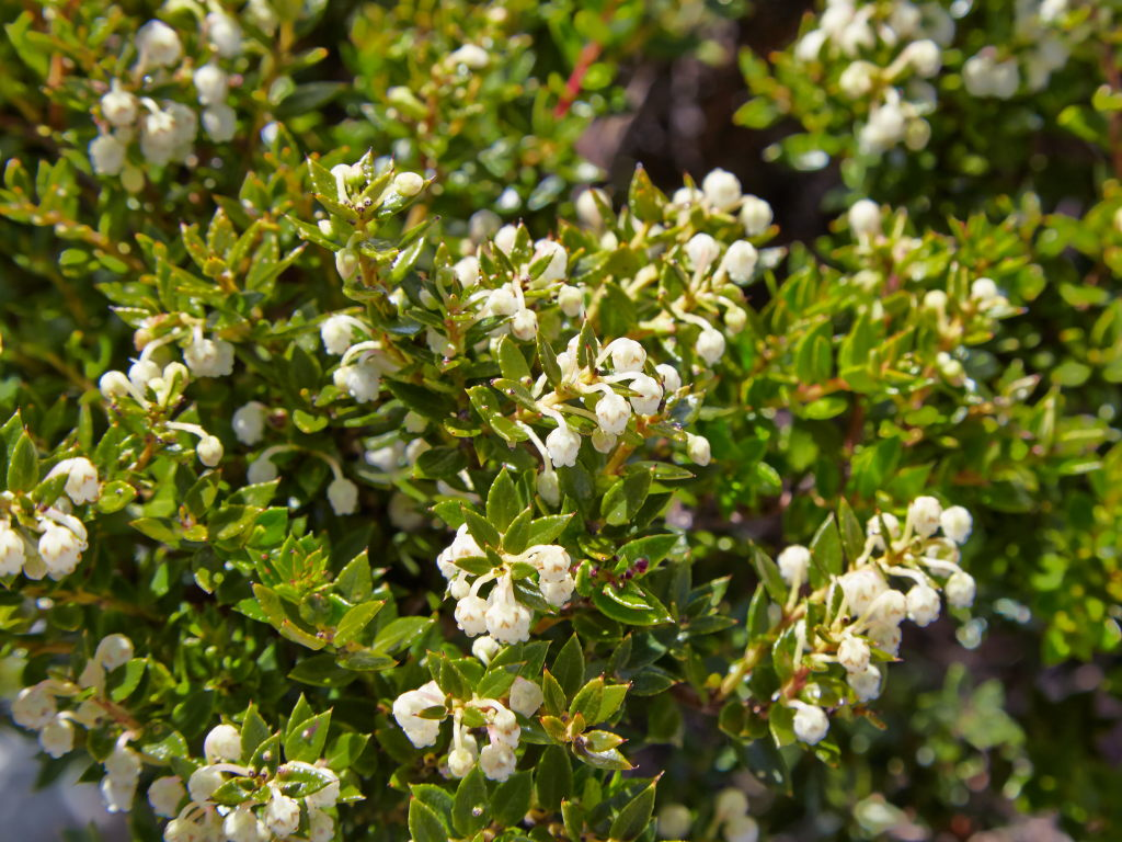 Escallonia alpina i Torres del Paine nationalpark.